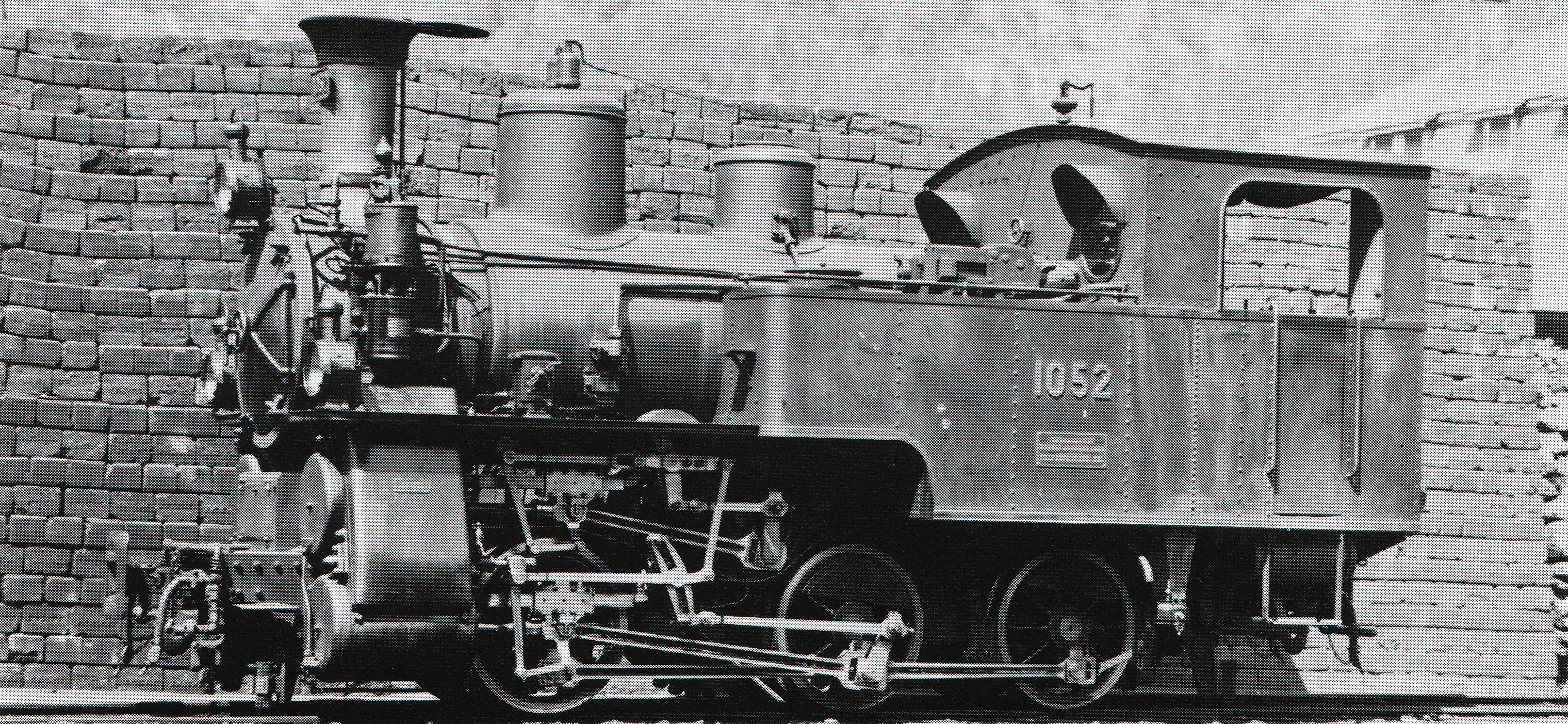 Zahnradlocomotive (Syſtem Riggenbach) HG 3/3 Nr. 1052 der Schweizeriſchen Bundesbahnen zum Betrib auf der Brünigbahn, gebaut 1905 inn der Schweizeriſchen Locomotiv- und Machines-Fabrique zů Winterthur (Fabr.-Nr. 1657), 1942 außer Dienſt geſtellt und anſchließend abgebrochen.